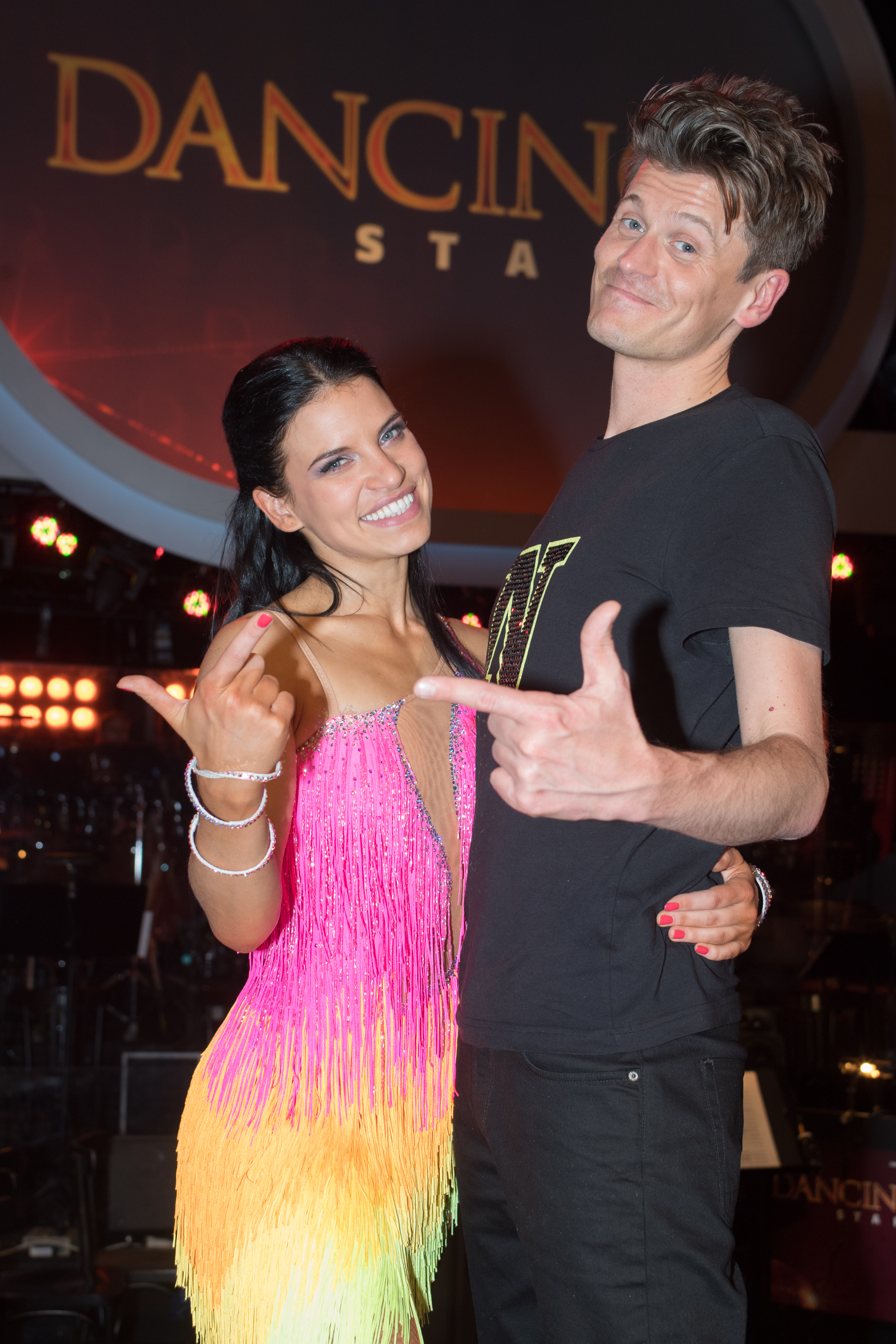 ORF Dancing Stars am 7. April 2017 in Wien. Bild zeigt Cornelia Kreuter und Norbert Schneider.